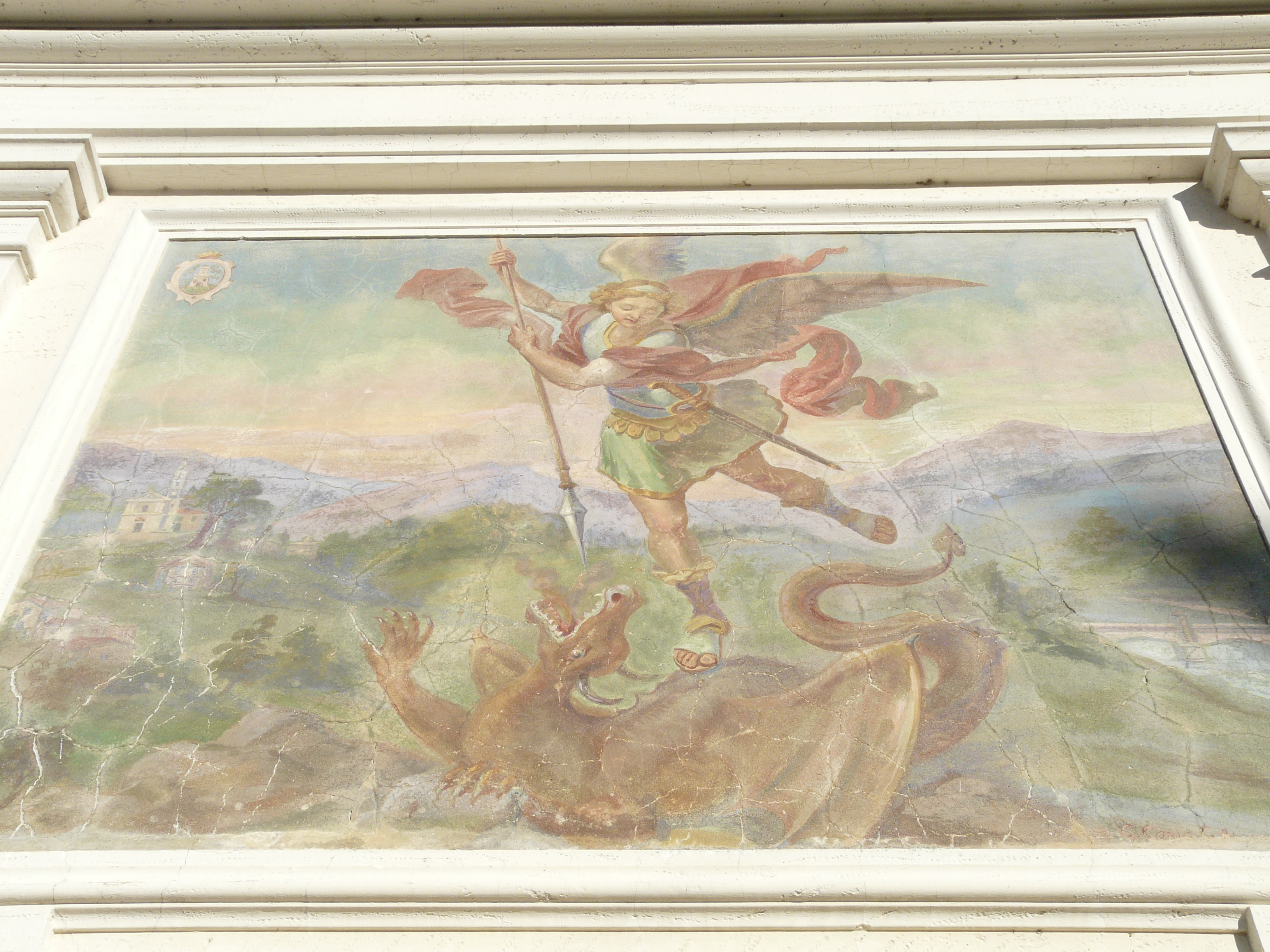 Affresco di San Michele Arcangelo, chiesa di San Michele Arcangelo, Frazione di Vignolo, Comune di Mezzanego, Liguria, Italia